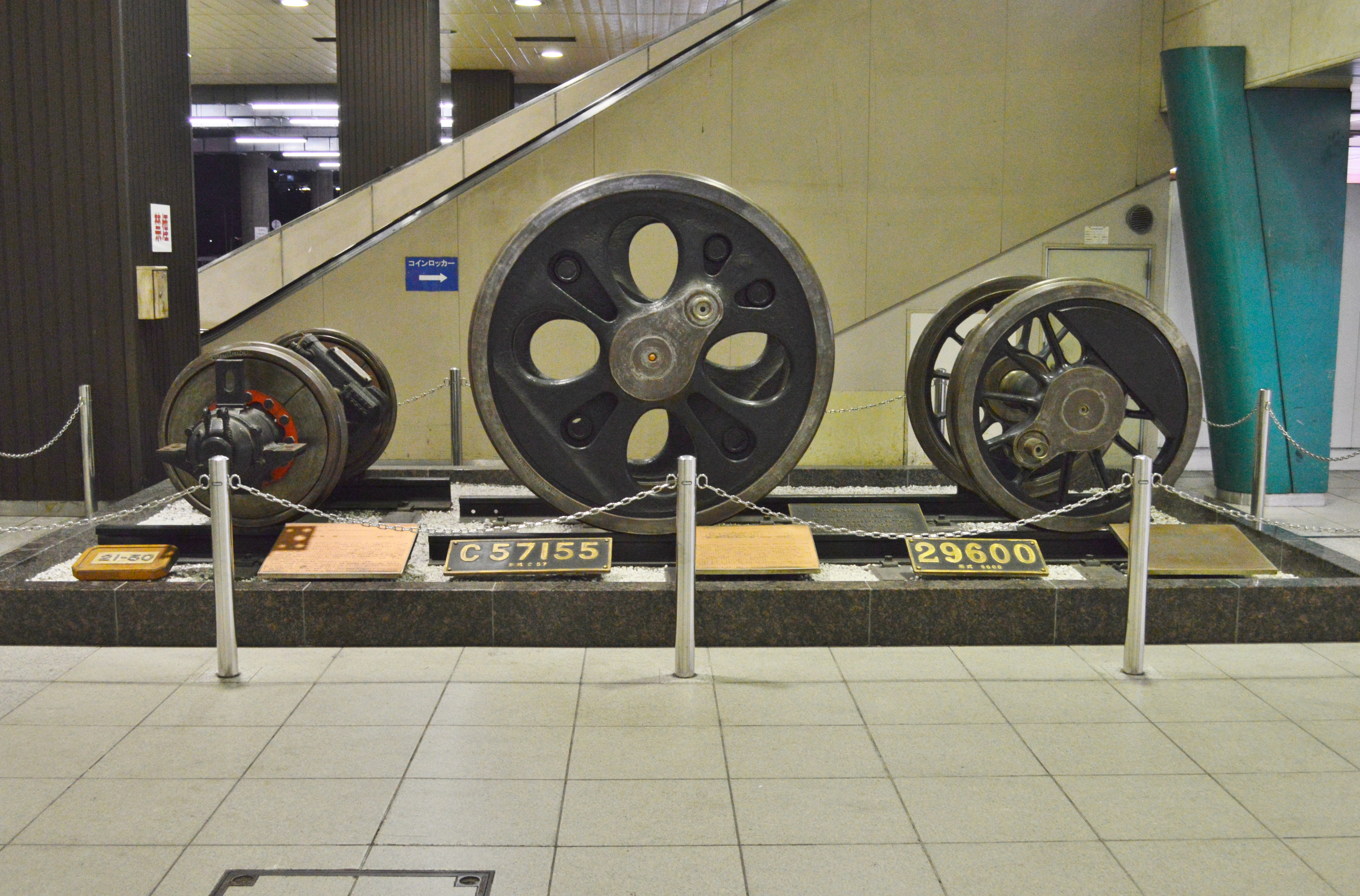 0系新幹線電車21-50号車車輪・C57 155第1動輪・29600第2動輪 (新大阪駅にて)